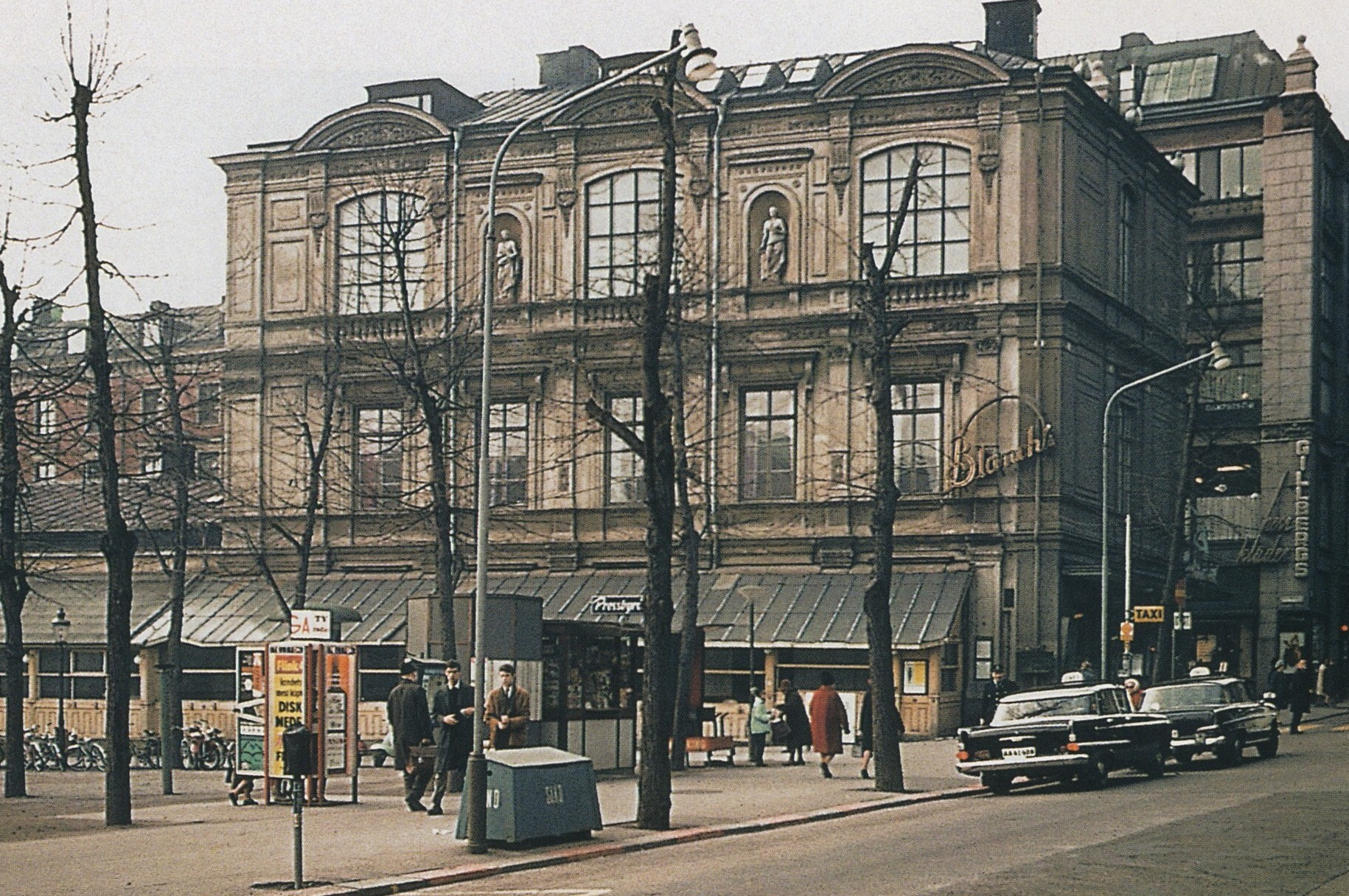 Blanchs teater vid Kungsträdgården i Stockholm, den 29 oktober 1964